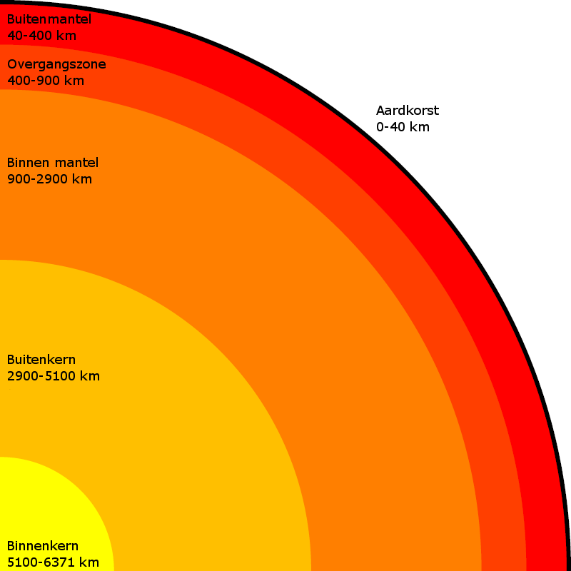 schema samenstelling aarde - afkomst: "Bild:Aufbau der erde schematisch.png" - tekst vertaald